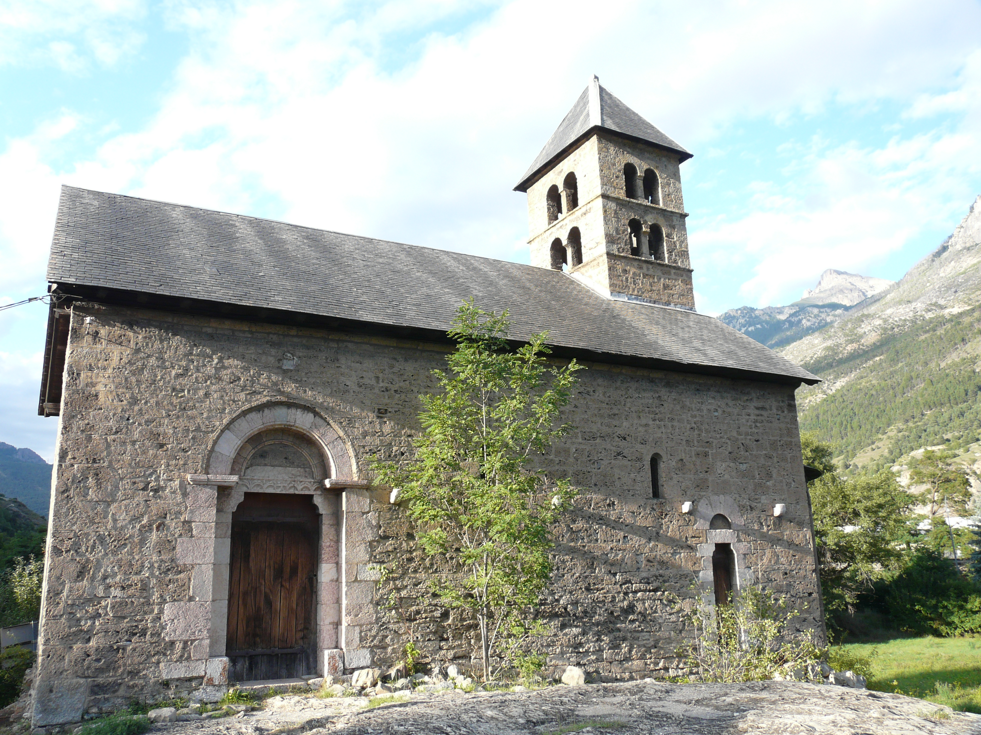 Chapelle Saint-Jean de L'Argentière-la-Bessée (Classé) .